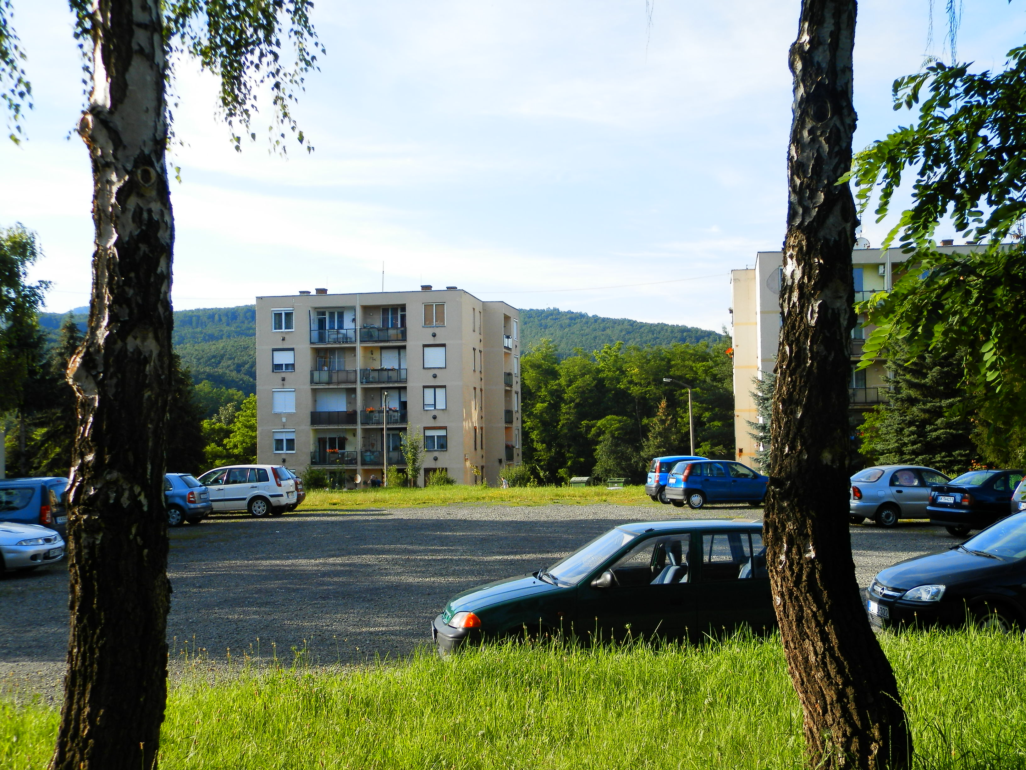 A Kemerovó-lakótelep "kiskörúti" része parkolóval, két fával és pár panelházzal